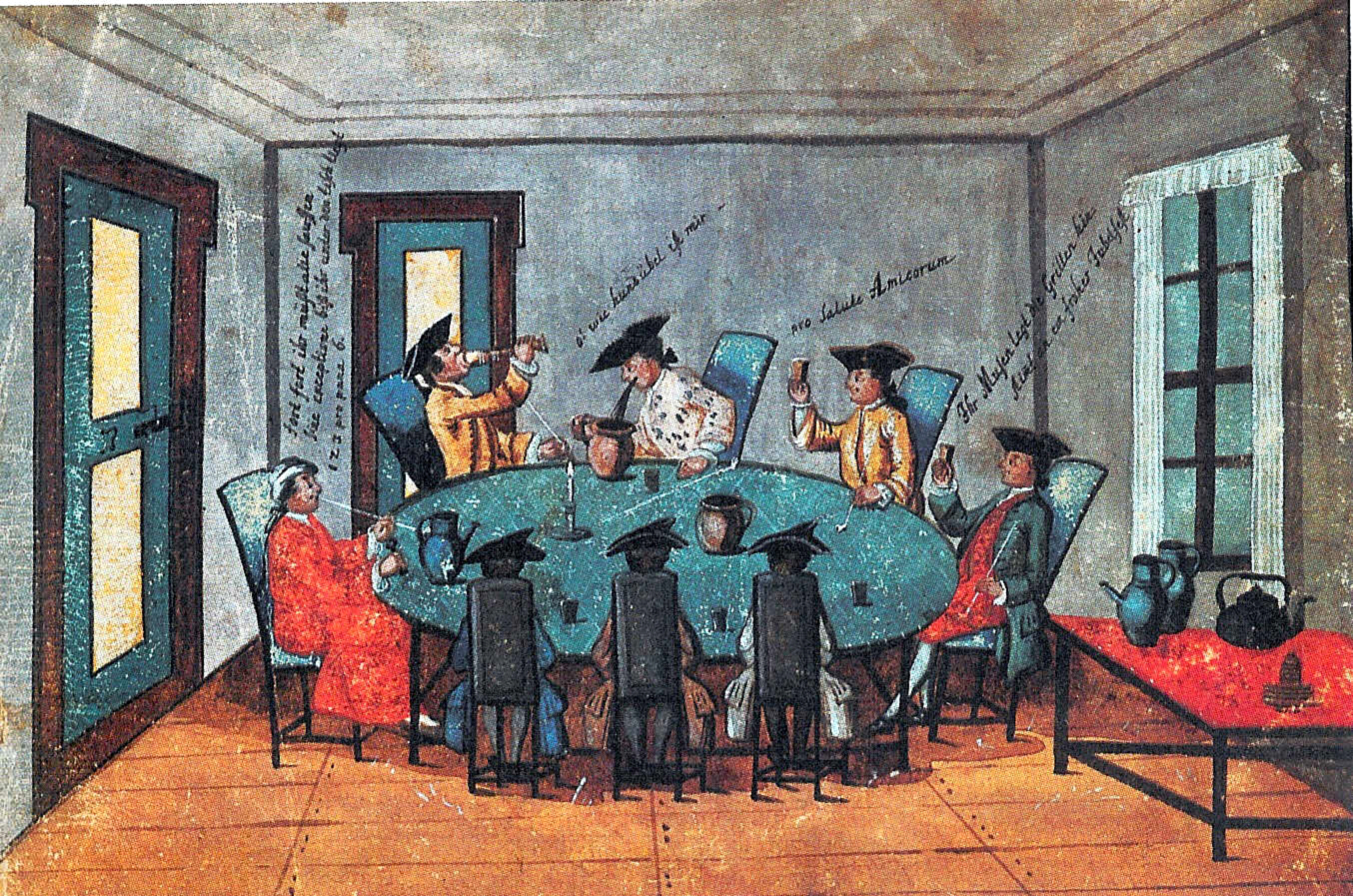 Stammbuchmalerei des "Stammbuchmalers mit dem schwarz-goldenen Rande", Jena um 1750: Der Gastgeber (links im Hausmantel mit Hausschlüssel) lässt seine Gäste trinken, "biß ihr unter dem tisch liegt". Während einer der Gäste beim Trinken ist, wird dem zweiten schon schlecht ("O! wie hundsübel ist mir"). Die beiden nächsten machen noch fröhliche und freundliche Trinksprüche ("pro Salute Amicorum", deutsch: "Auf das Wohl der Freunde" und "Ihr Musen legt die Grillen hin: Stimmt an ein frohes Jubelfest"). Rechte abgelaufen, Public Domain